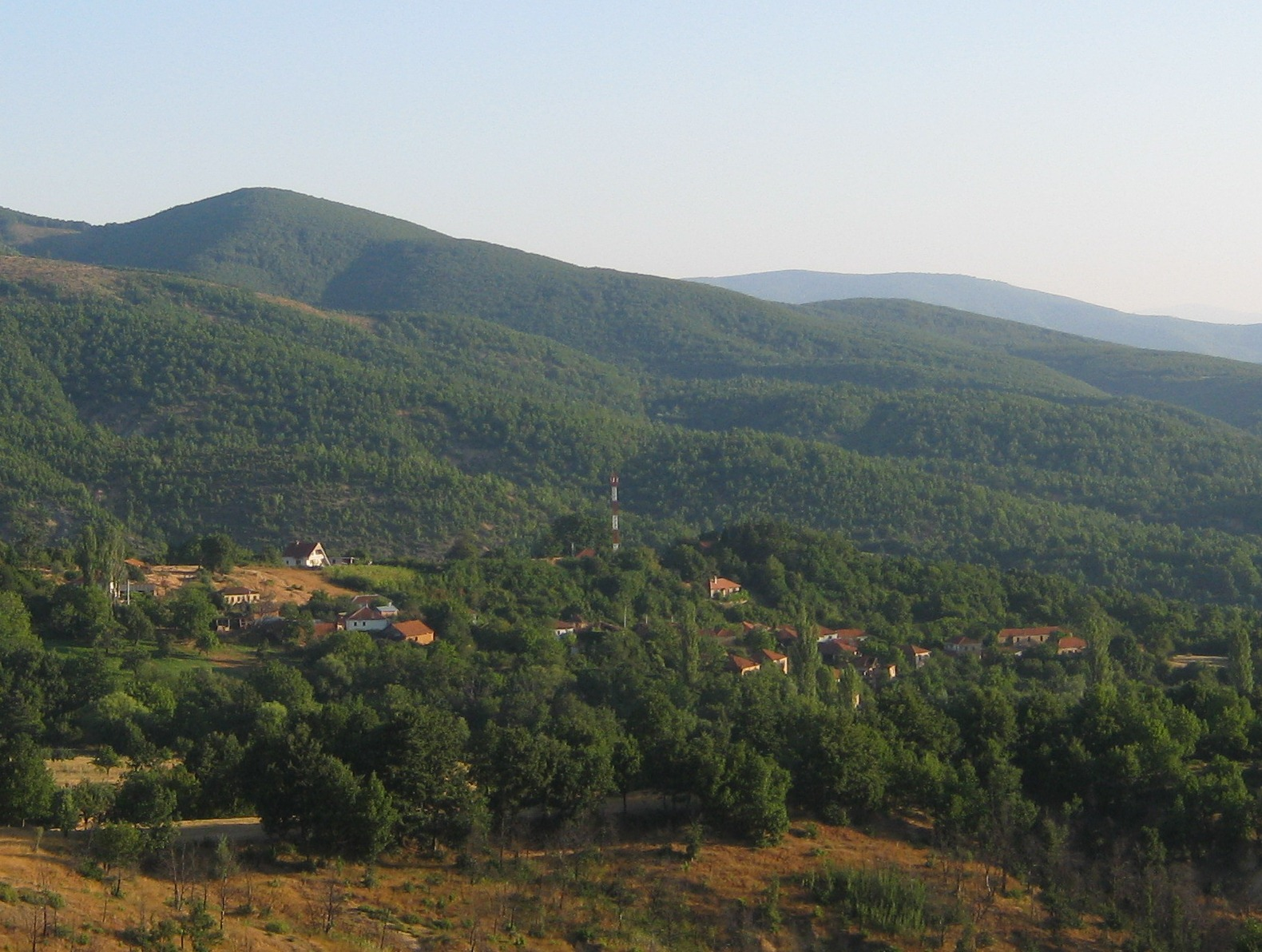 село Ѓавато - Савева мала